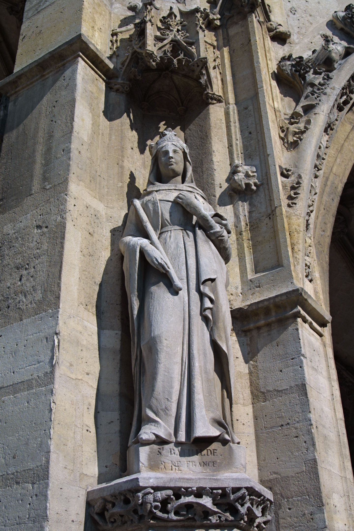 Statues of Église Saint-Germain-l'Auxerrois de Paris